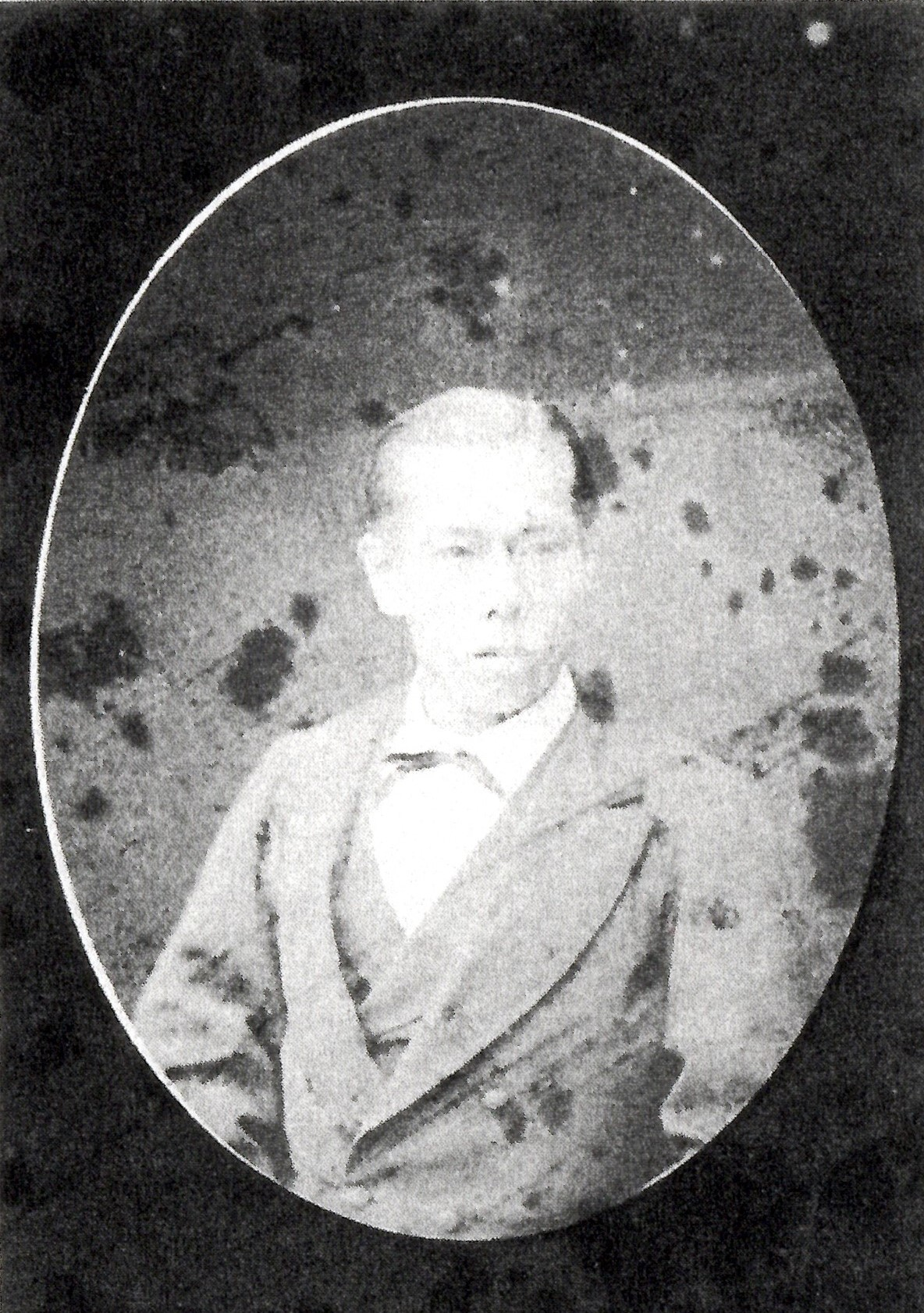 石山基正の肖像写真。